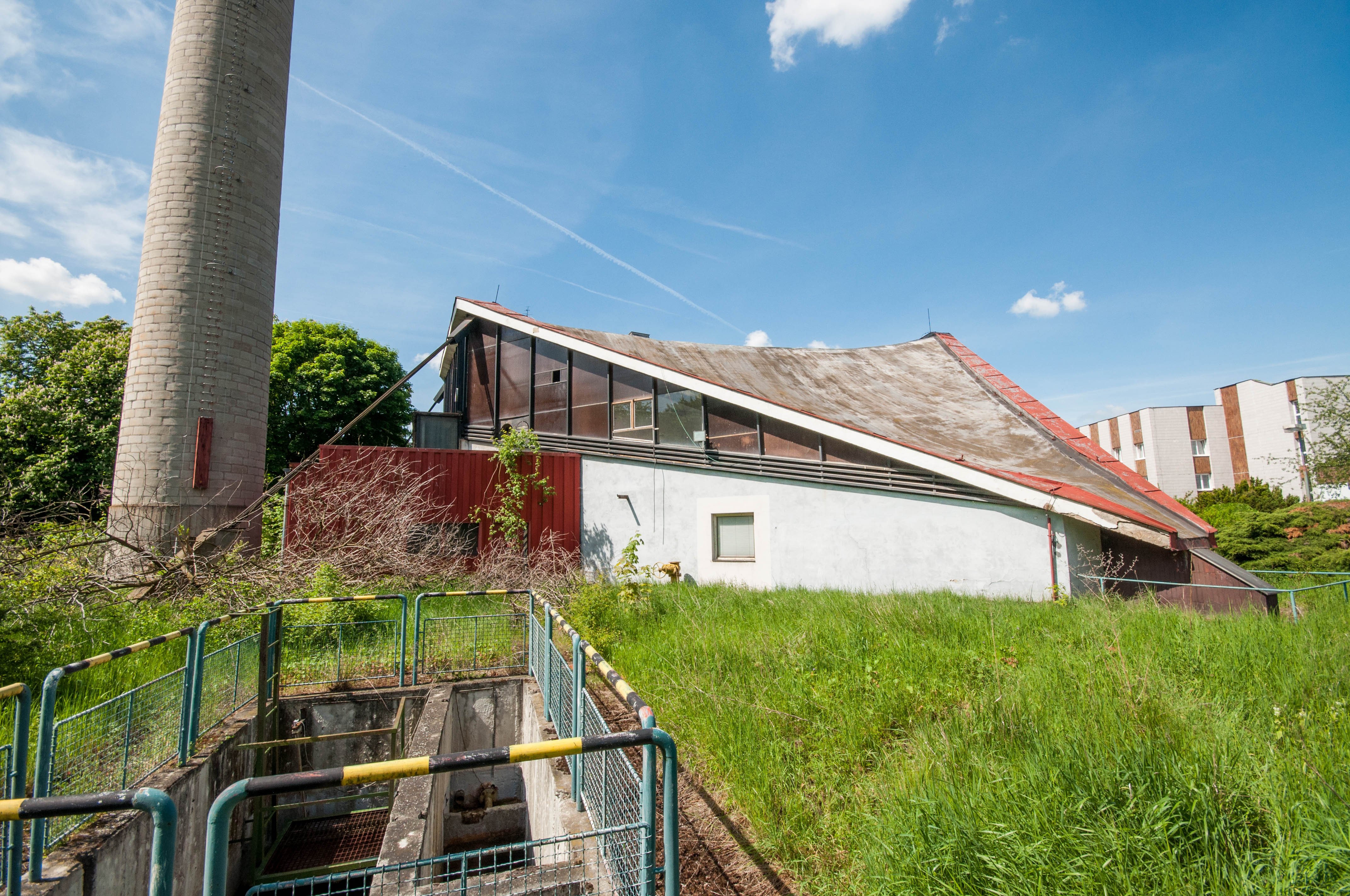 Mazutová výtopna na Invalidovně v Praze 8, pohled ze zahrady